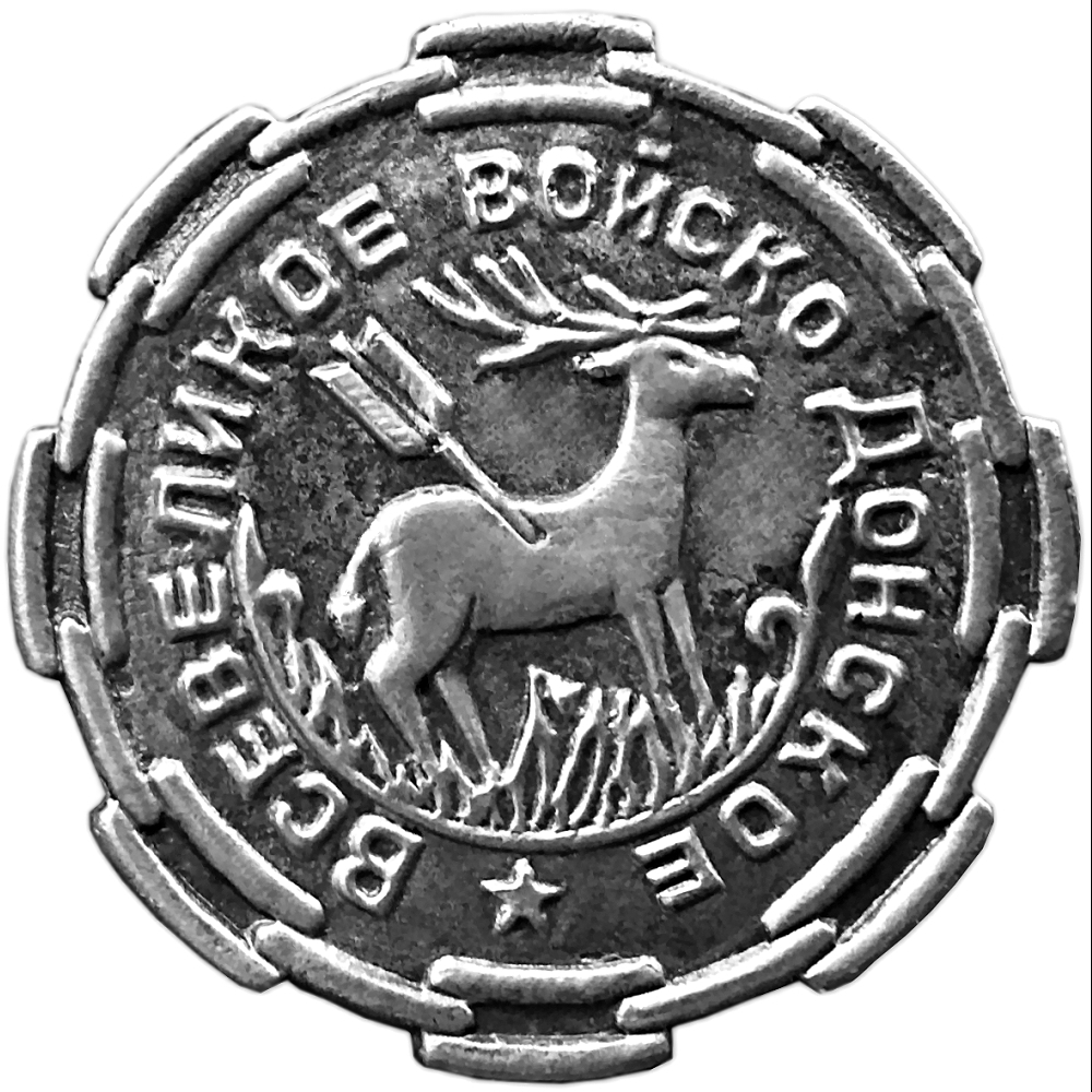 Медаль Всевеликого войска Донского: Защитнику вольного Дона 1917-1919 (аверс)